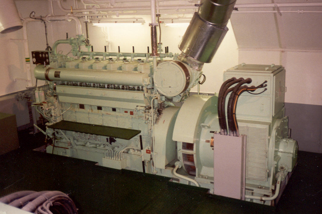 Hilfsdiesel auf einem Frachtschiff